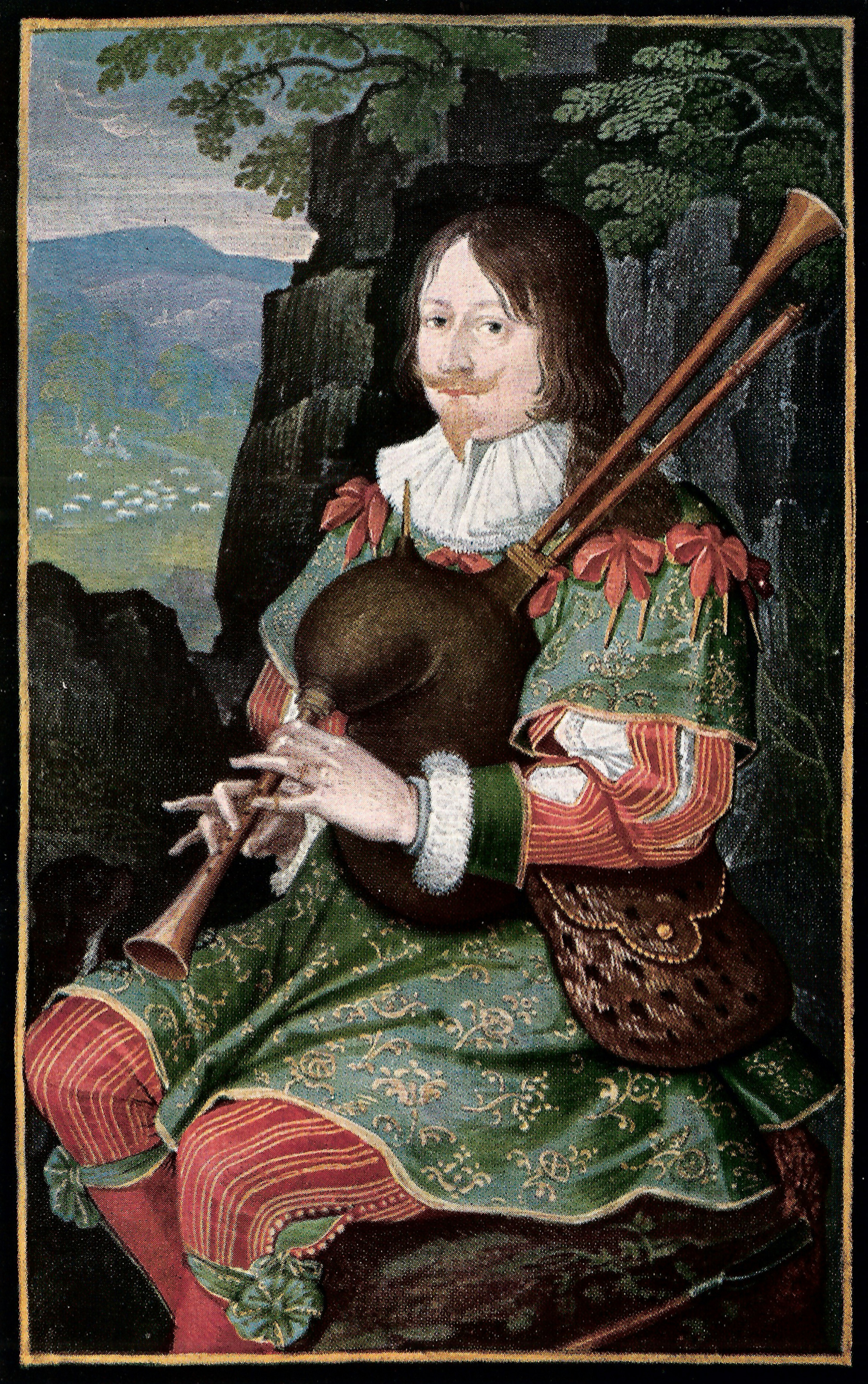 Georg Friedrich Herr zu Rappoltstein (* 14.7.1594; † 20.8.1651) (Miniatur auf Pergament)